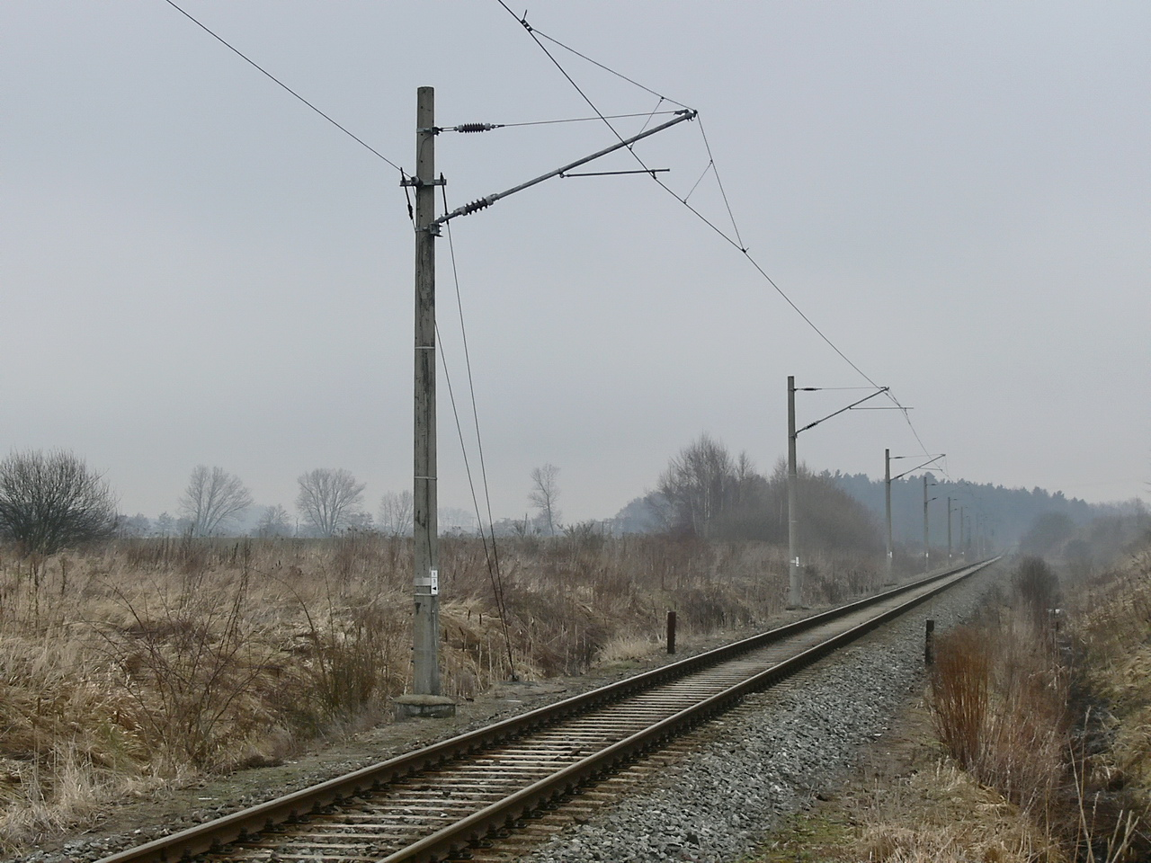 Die elektrifizierte Werkbahn nach Poppendorf